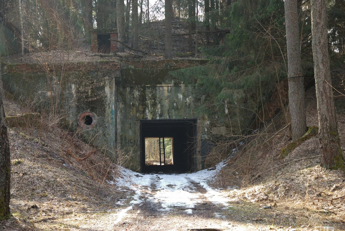 Выгода. Сховішча ядзерных боепрыпасаў